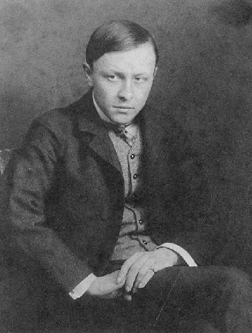 Fotografie des Künstlers Alfred Kubin von Nicola Perscheid.